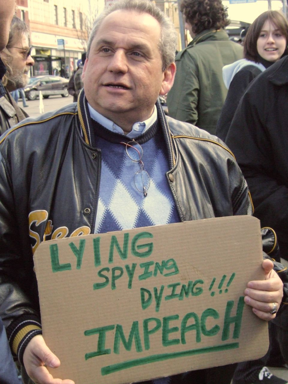 Anti-War Rep Jim Ferlo